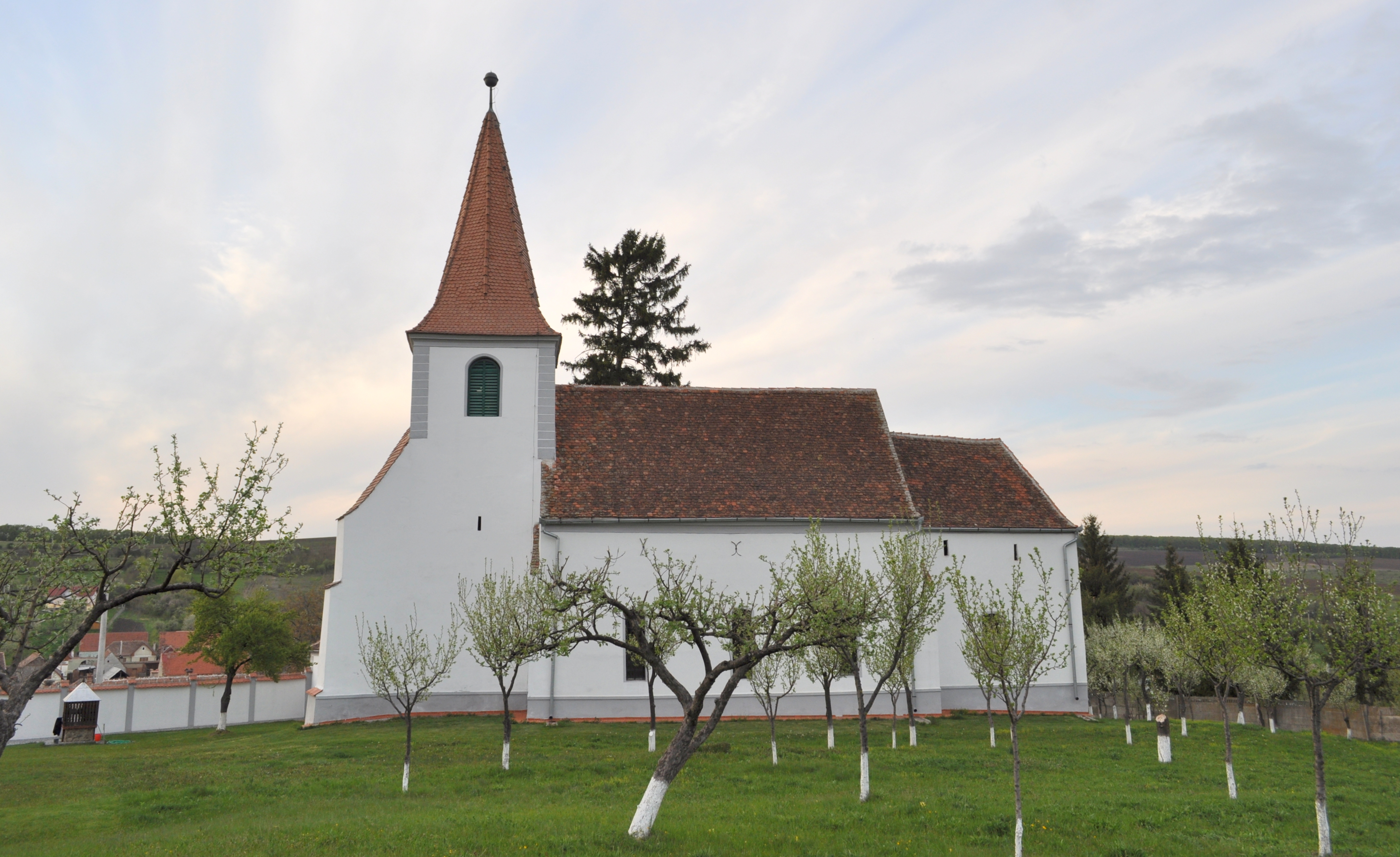 Lutheran church in Reciu (Rätsch), Romania